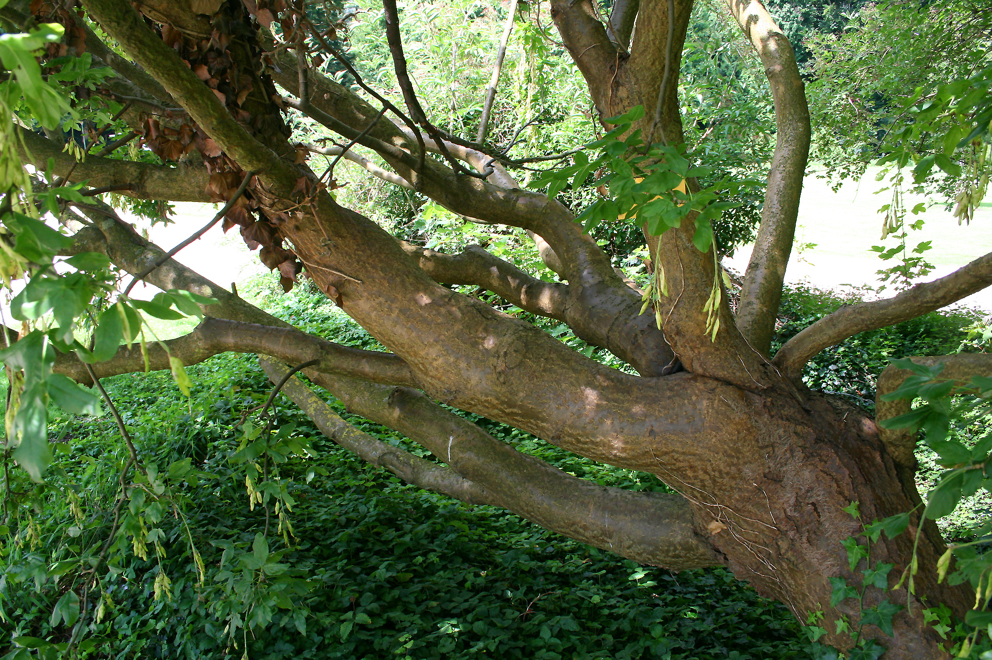 Écorce du Cytise des Alpes (Laburnum alpinum) . Position exacte : Meise (Belgique) – Jardin botanique National de Belgique.